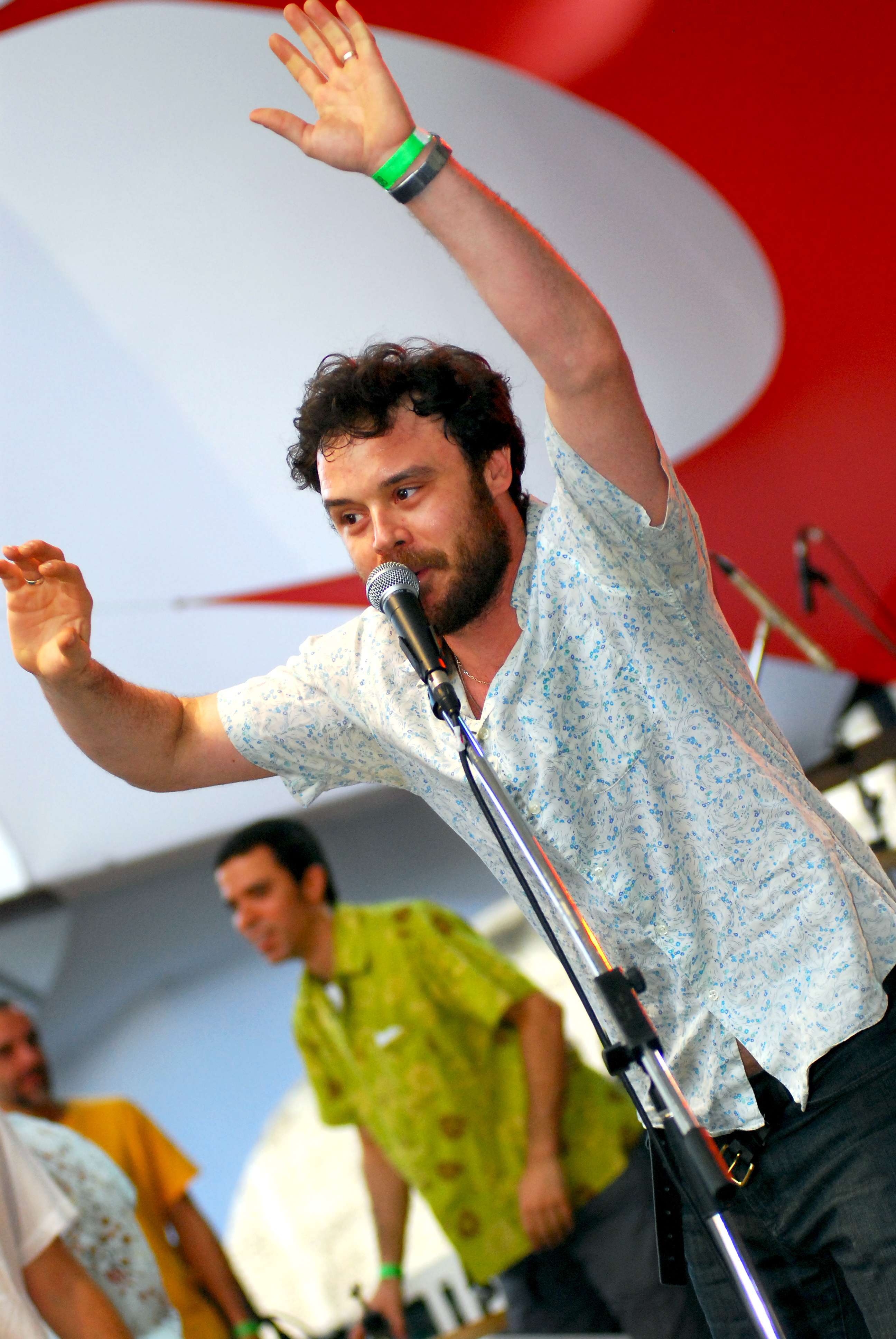 Foto: Silvio Tanaka.